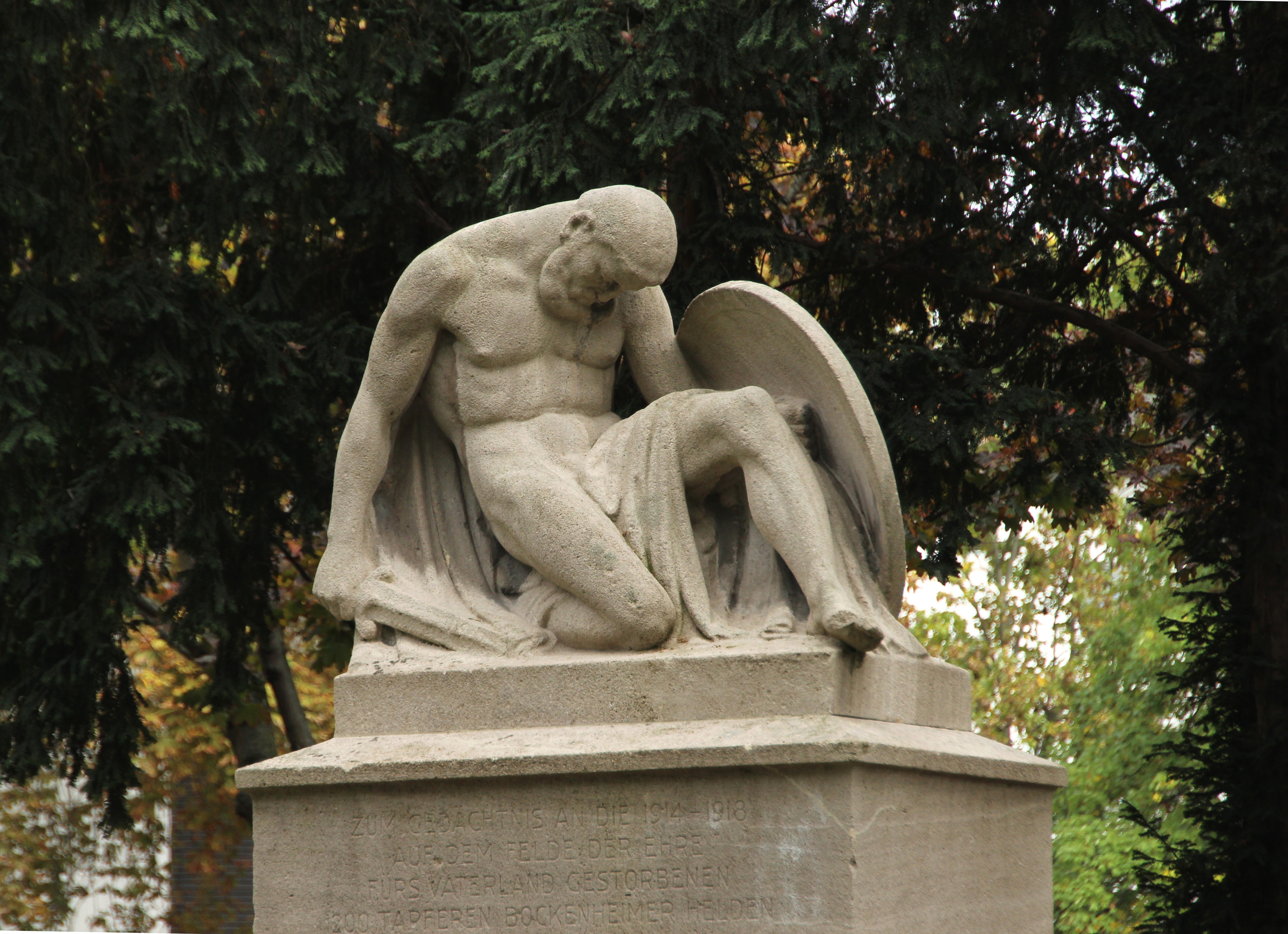 Bildinhalt: Kriegerdenkmal in Bockenheim am Rohmerplatz, errichtet 1925 Bildhauer: Oscar Ufert (1876–1952), Frankfurt am Main Im Sockel eingravierte Texte: "Zum Gedächtnis an die 1914-1918 auf dem Felde der Ehre fürs Vaterland gestorbenen 1200 tapferen Bockenheimer Helden." "Errichtet vom Kriegerverein Bockenheim aus Anlass seines fünfzigjährigen Stiftungsfestes von den dankbaren Einwohnern Bockenheims." Aufnahmeort: Frankfurt am Main, Deutschland